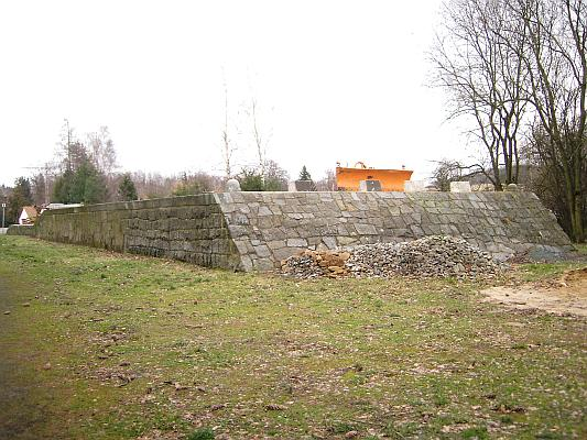 nakládací rampa v Beiersdorfu